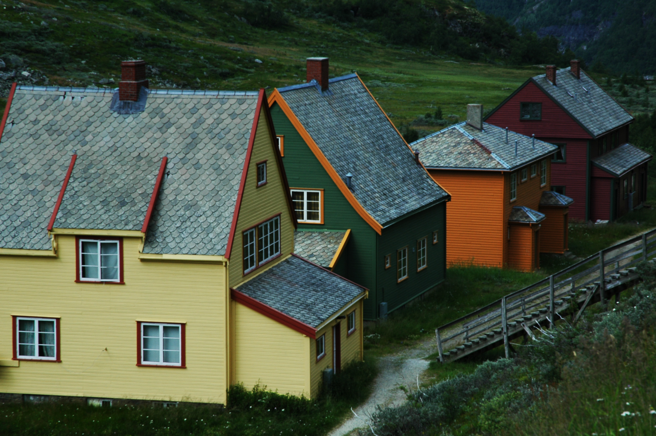 Scandinavische huisjes nabij Flåm, Noorwegen; (en) Scandinavian houses in Myrdal nearby Flåm, Norway